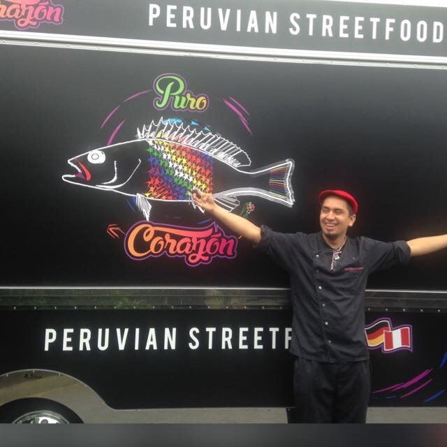 Simón Limón vor seinem Puro Corazón Foodtruck während der Karawane der Köche